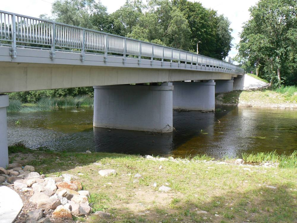 Suurejõe maanteesild